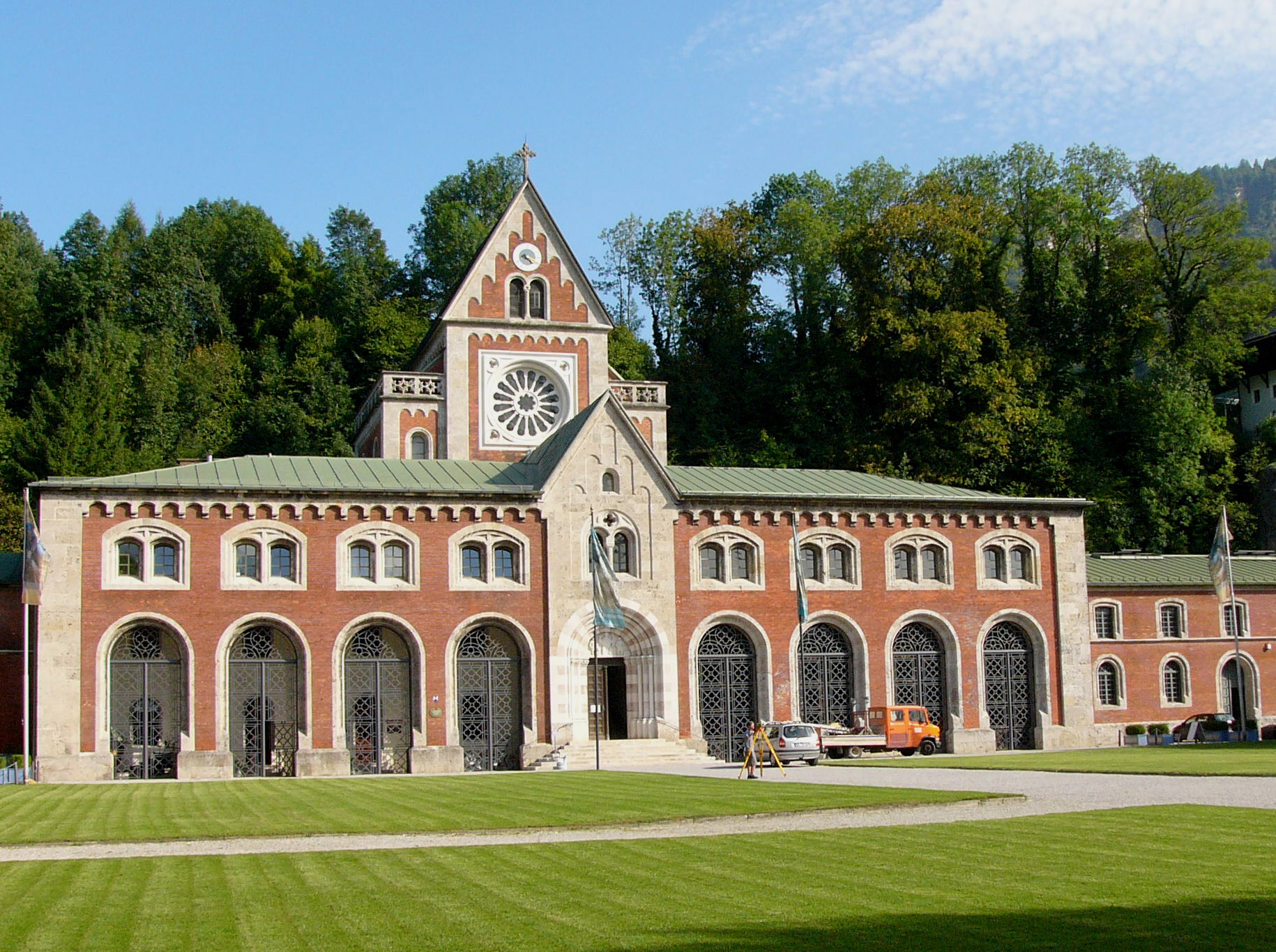 Alte Saline, Bad Reichenhall, Germany